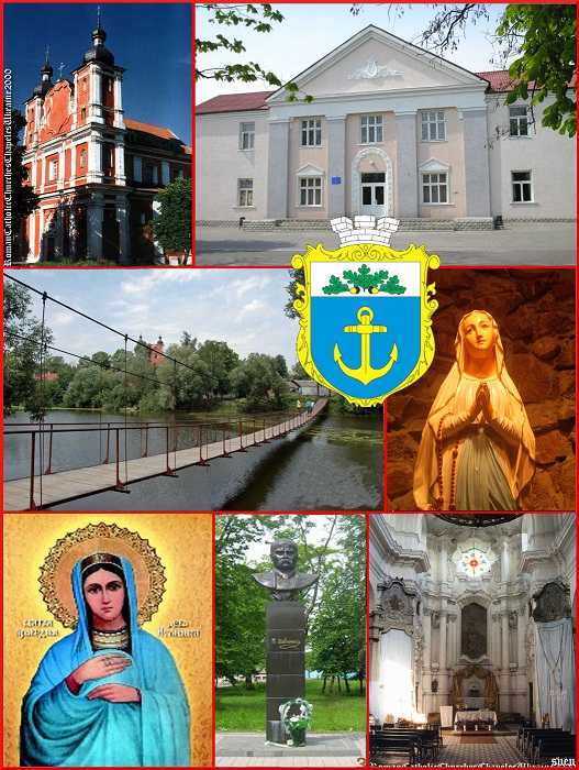 dubrovycia